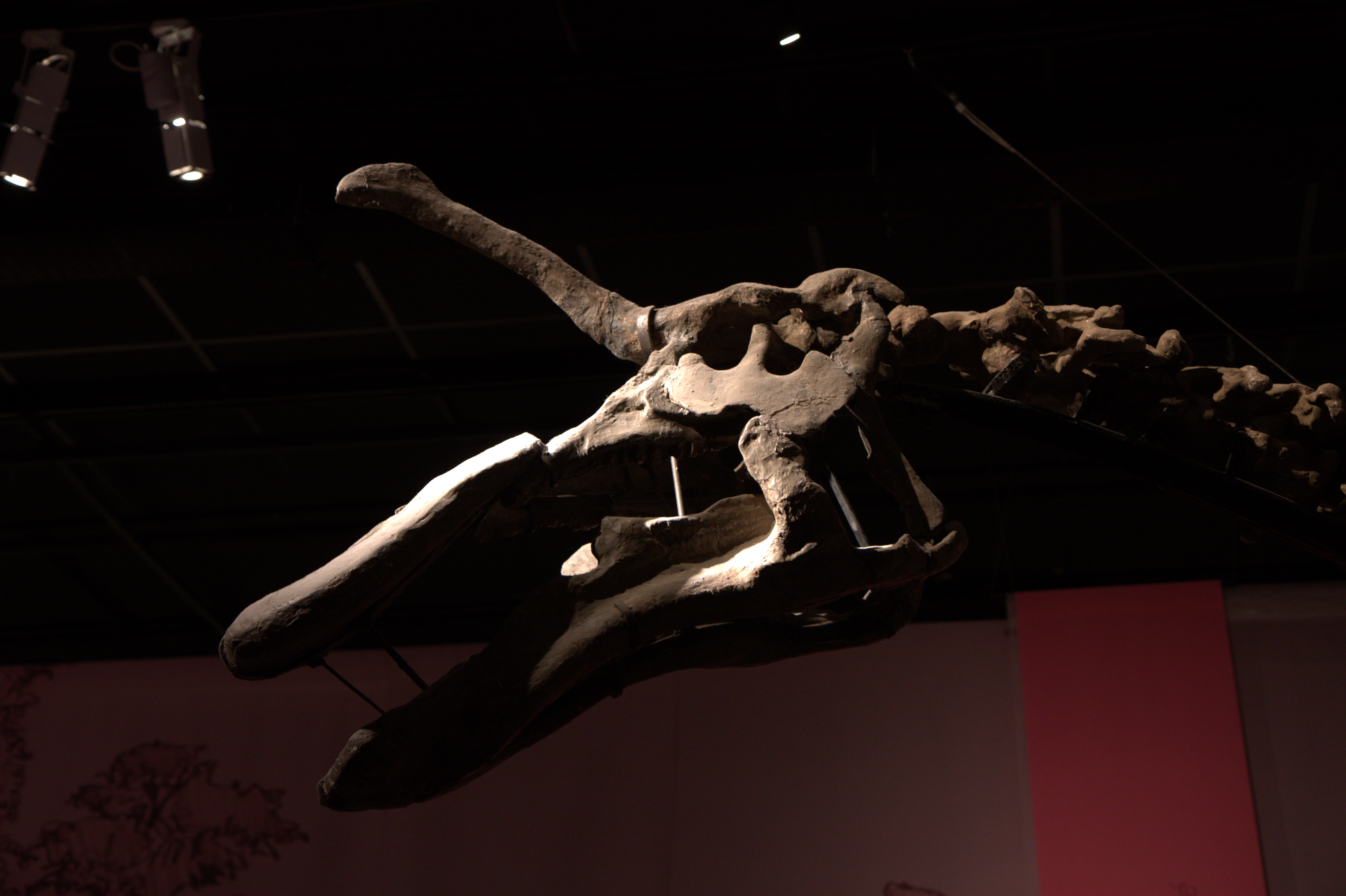 Daté entre 83 et 71 millions d'années, ce squelette incomplet a été découvert en Chine dans la province du Shandong. The making of this document was supported by Wikimédia France. (Submit your project!)